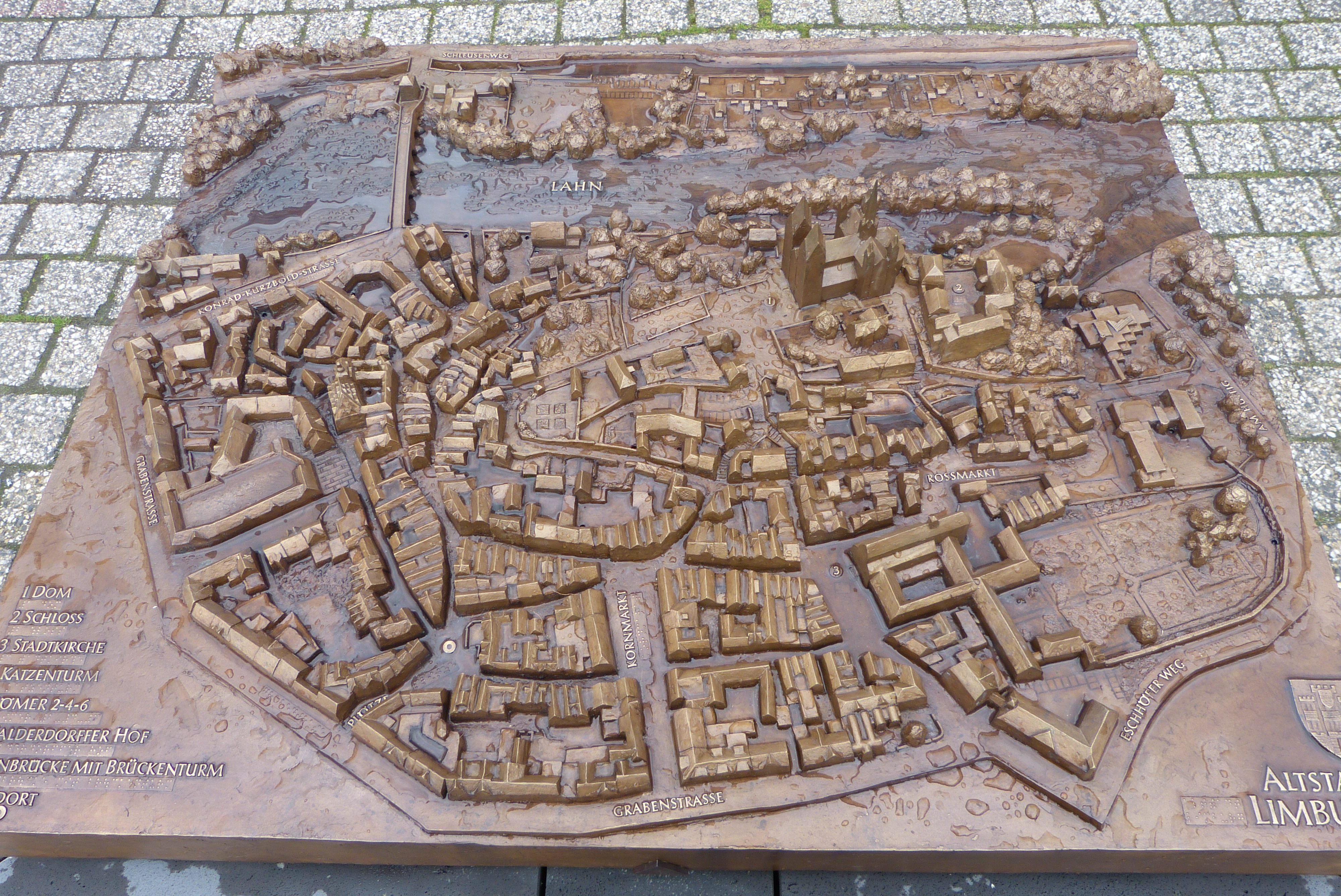 Limburg an der Lahn, Hessen, Deutschland. Plötze: Modell der Altstadt